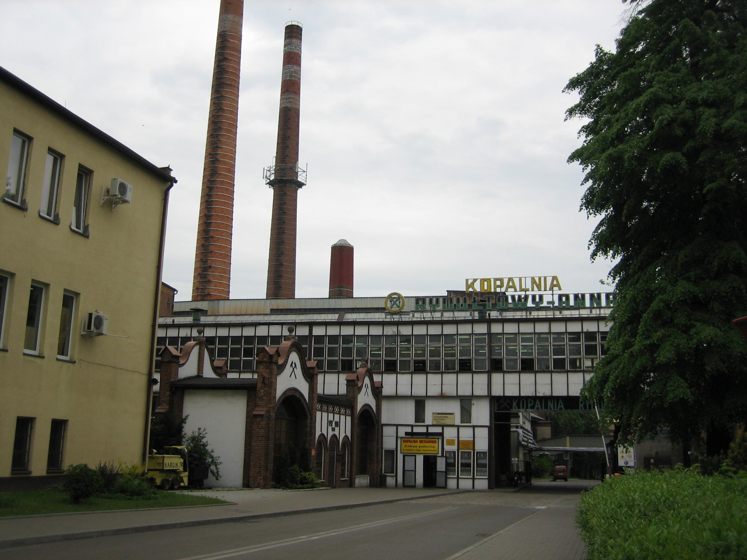 Brama wjazdowa do kopalni. Jestem autorem zdjęcia